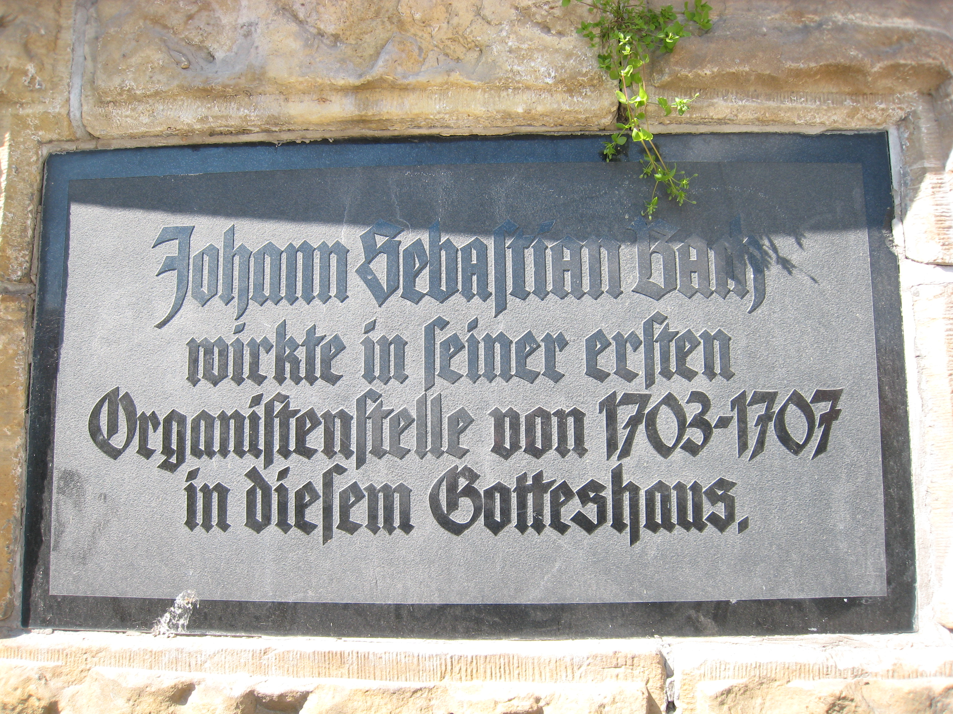 Erinnerungstafel an Johann Sebastian Bach an der Bachkirche in Arnstadt.